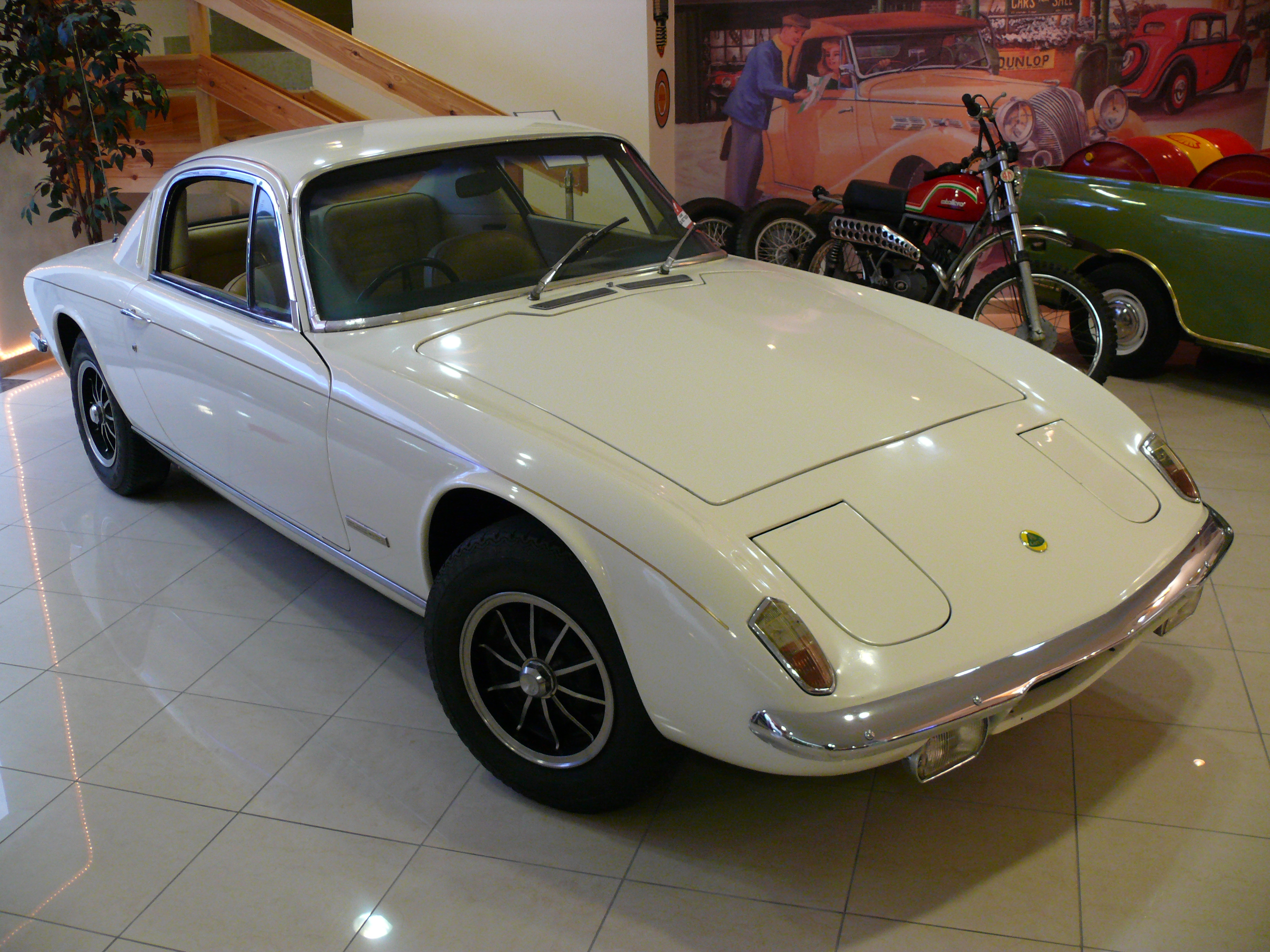 Lotus Elan S130 Coupe 2+2, Malta Classic Car Museum